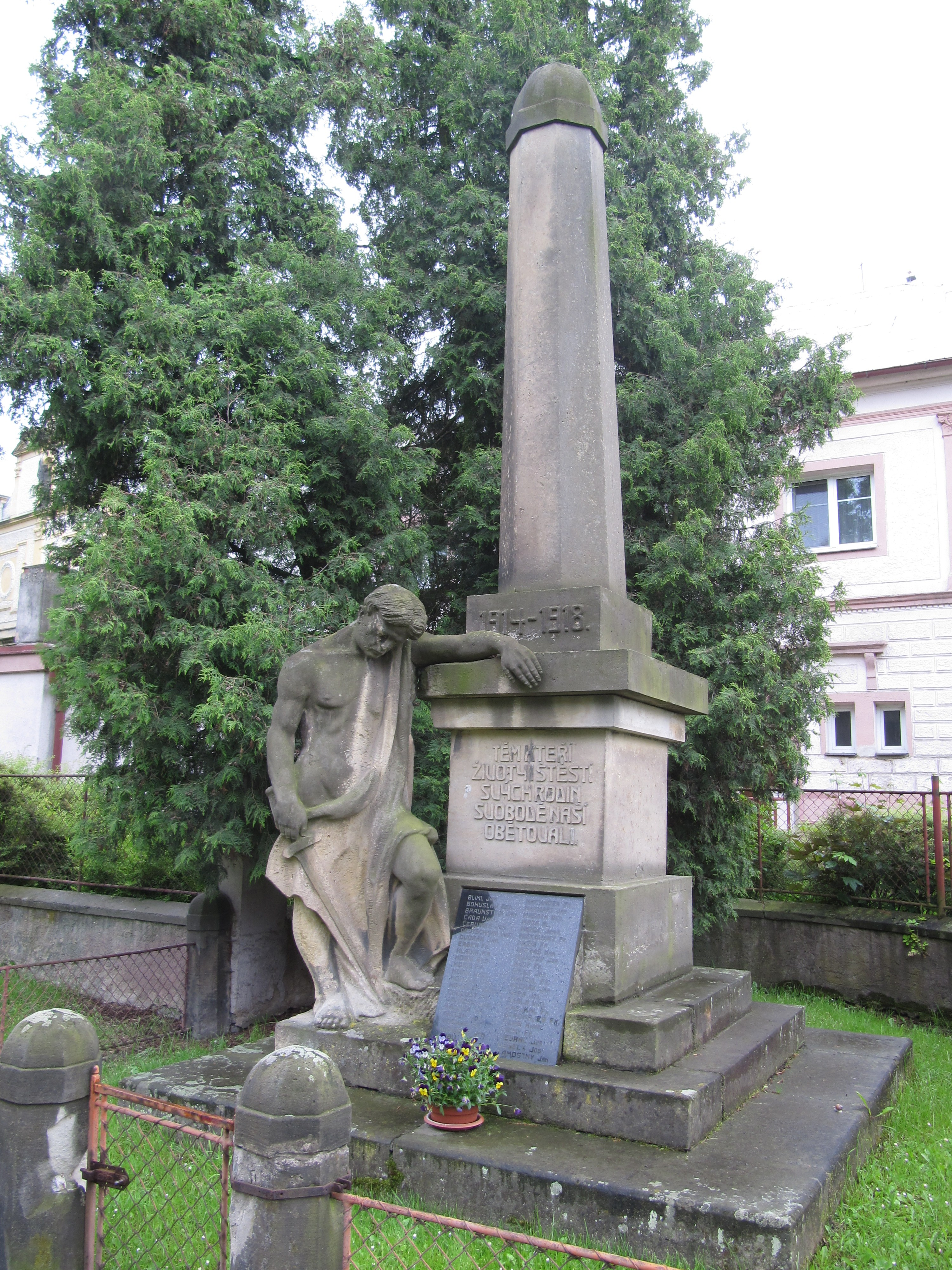 Kounice, pomník obětem I. světové války